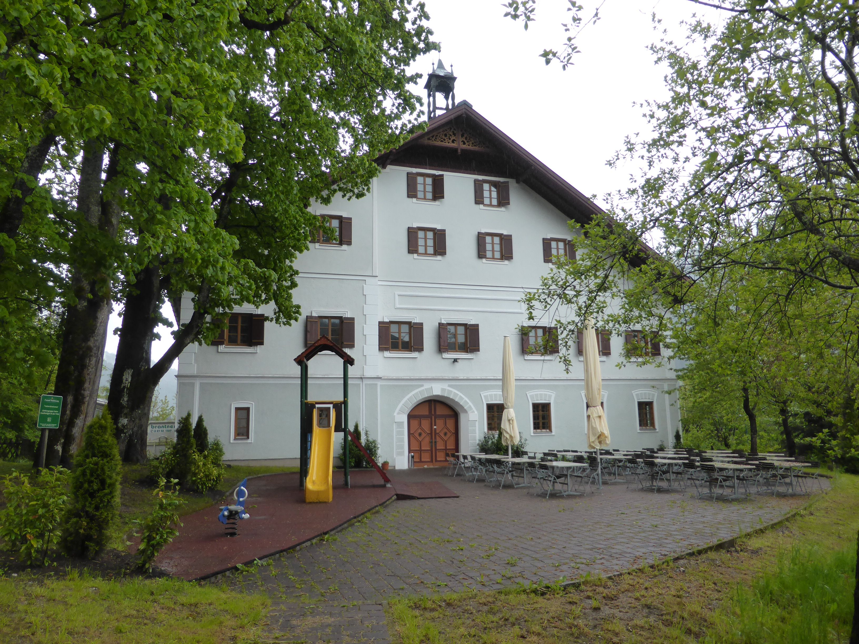 Ehem. Bauernhof, Gasthofgut; Raststation